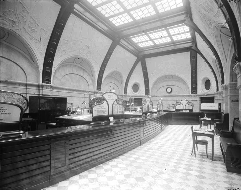 Interiör ifrån bankhallen i Sundsvalls Enskilda Bank, Fredsgatan 4 År 1905